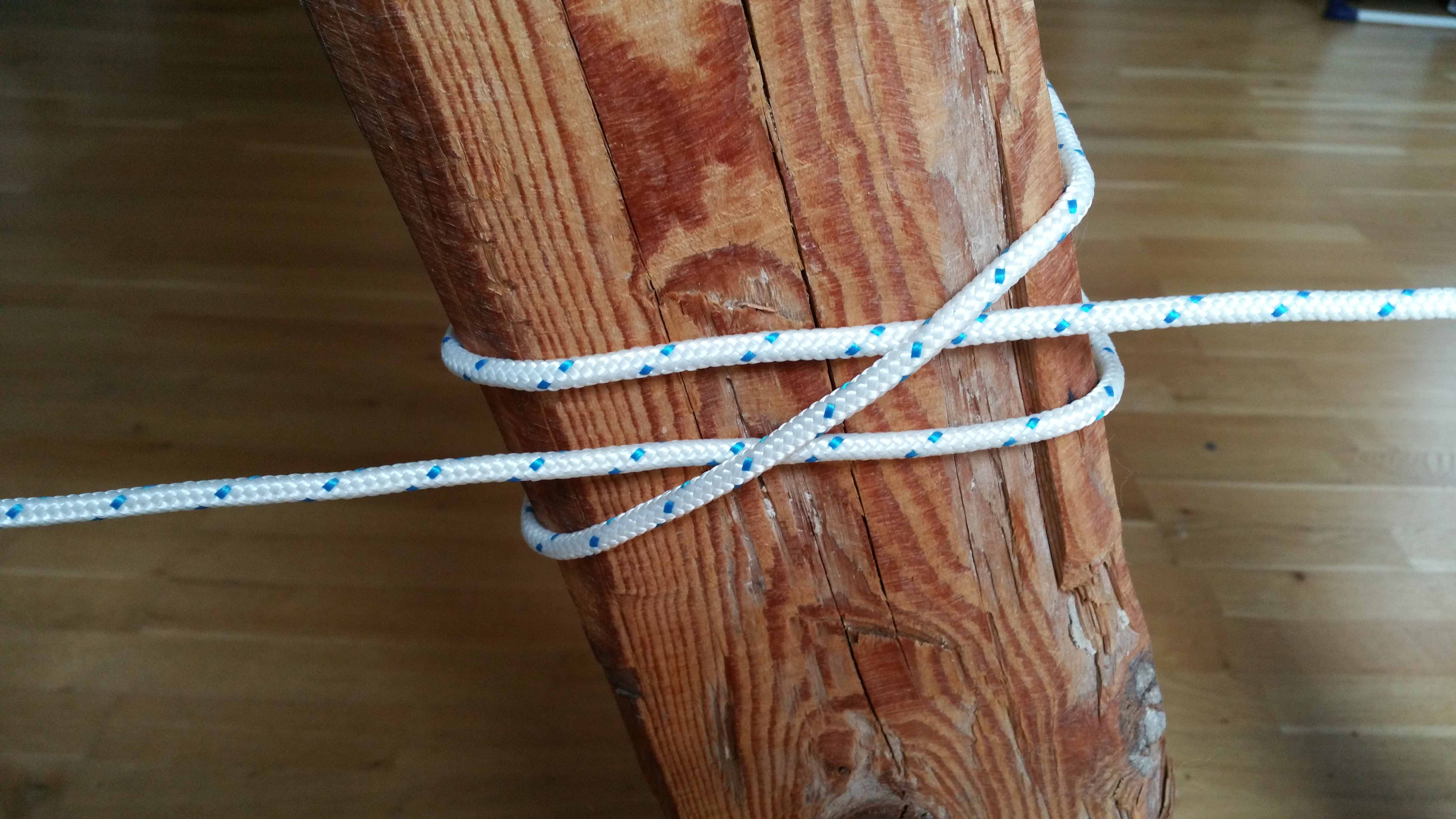 Webeleinenstek mit zwei linken Törns. Unterstes Seil befindet sich links